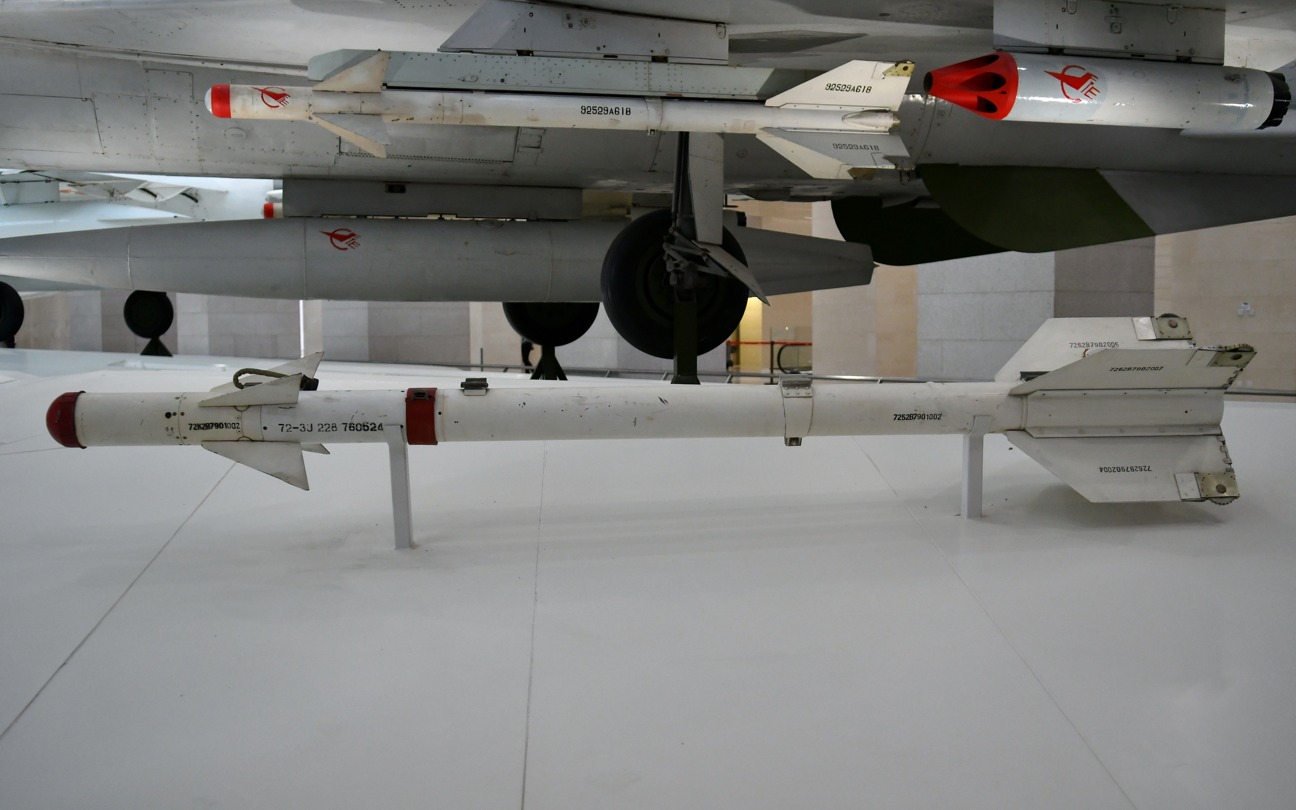 中国格斗型空空导弹，拍摄于中国人民革命军事博物馆。